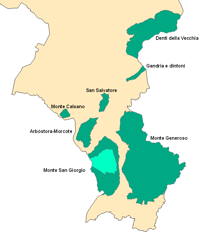 Pointe sud du Tessin, les différents sites classés IFP par la confédération suisse, et le site du Monte San Giorgio classé au patrimoine mondial. Sources : OFEV